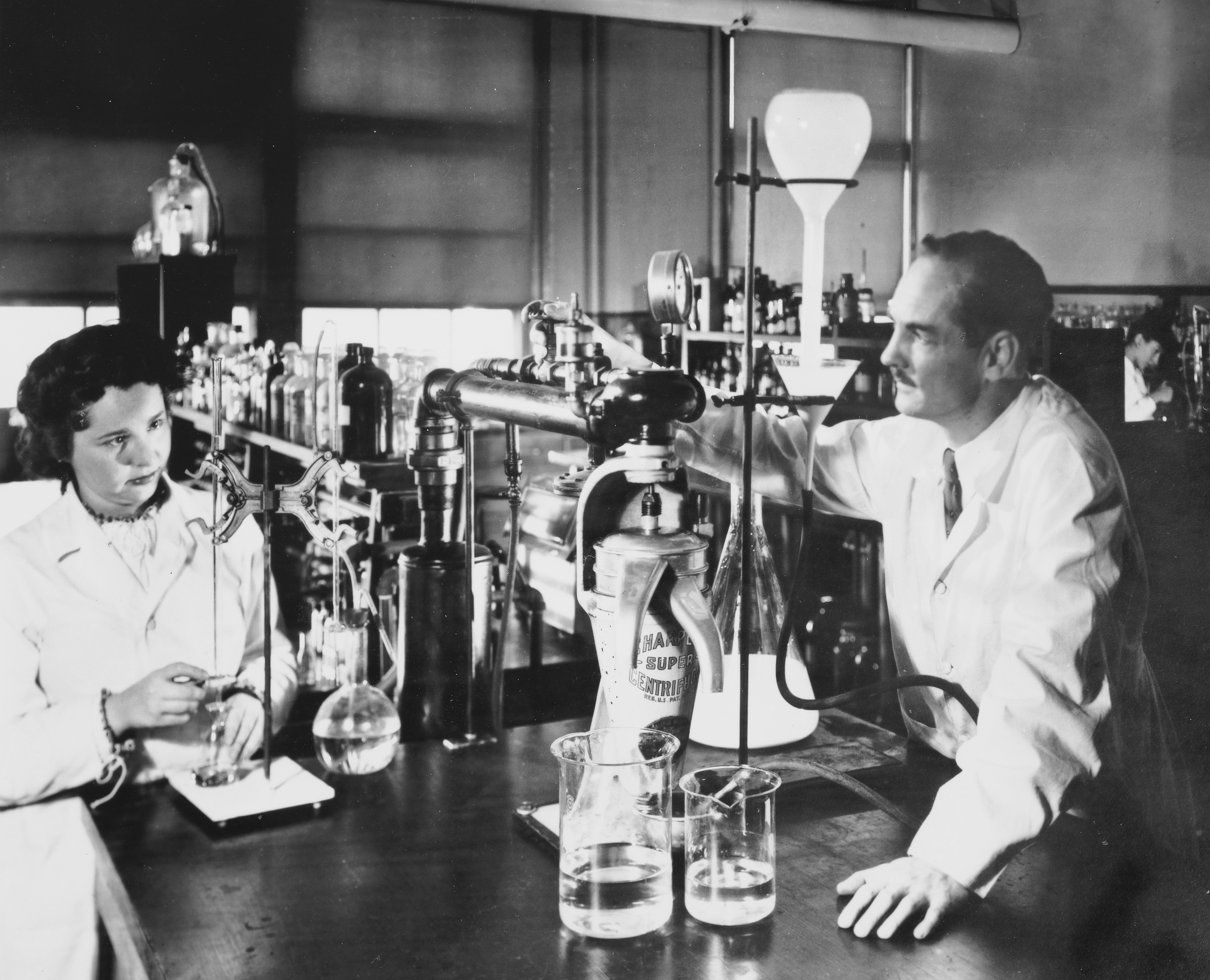 Nobel Prize winners, Dr Hitchings and Dr Elion